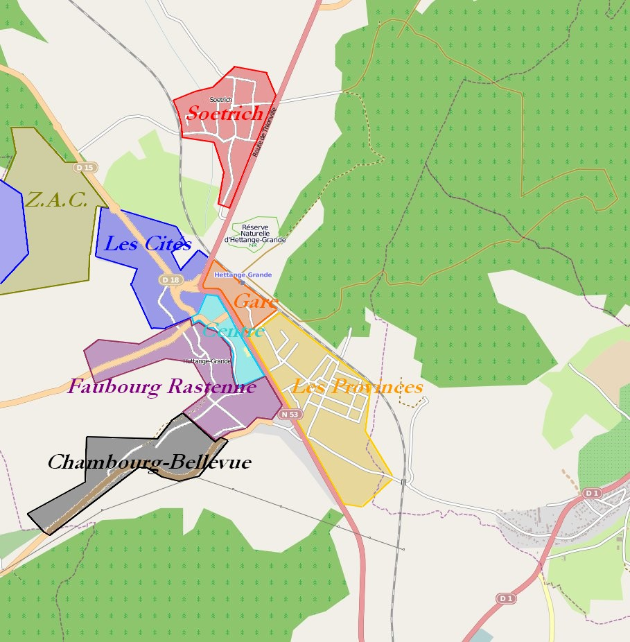 Plan approximatif d'Hettange-Grande (57)